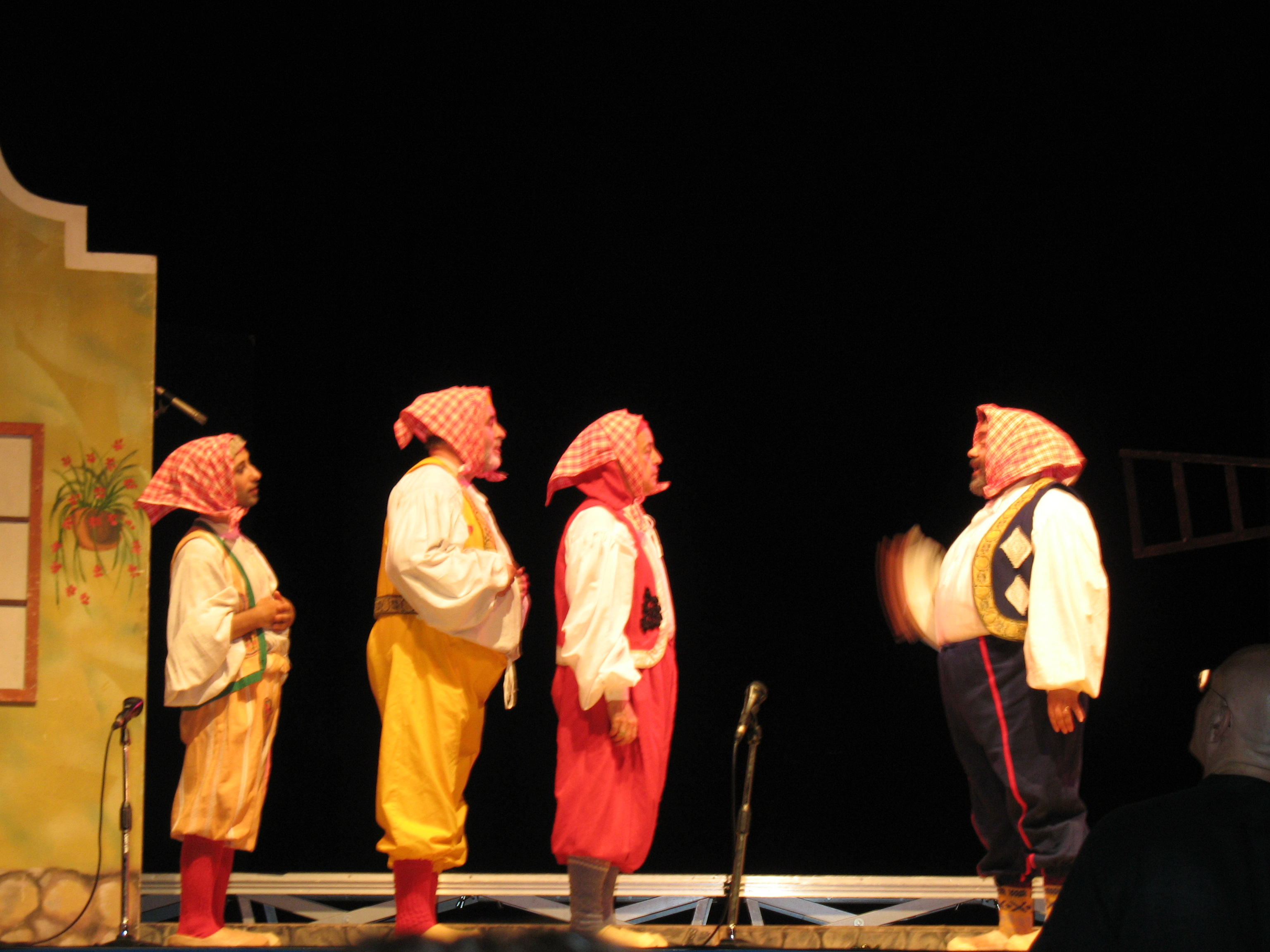 Genova - porto antico Compagnia Alfa Folies - Il paese dei campanelli - Nella foto: Andrea Del Conte, Ugo De Los Rios, Augusto Grilli, Claudio Bertoni